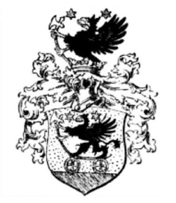 Wappen der Welling (Philipp Welling von König Stefan v. Polen geadelt).